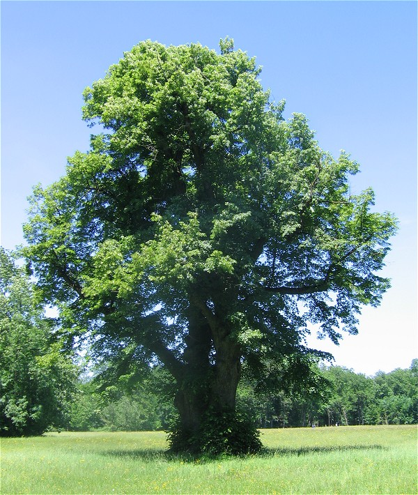 Winterlinde (Tilia cordata) in Muenchen Englischer Garten, ca. 200 Jahre alt